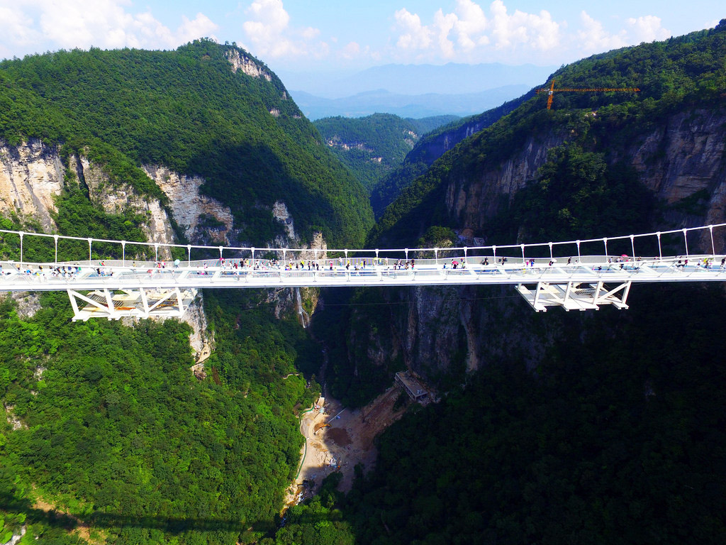 Ապակե կամուրջ 2